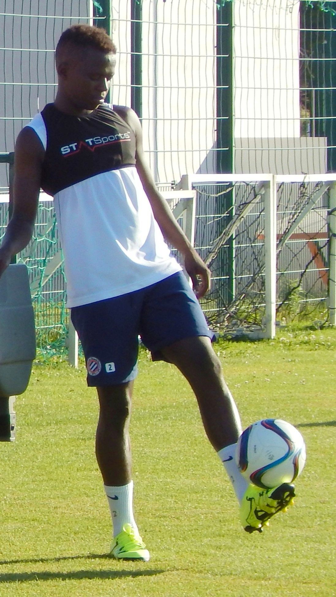 Mamadou Ndiaye (Montpellier), Juillet 2015.